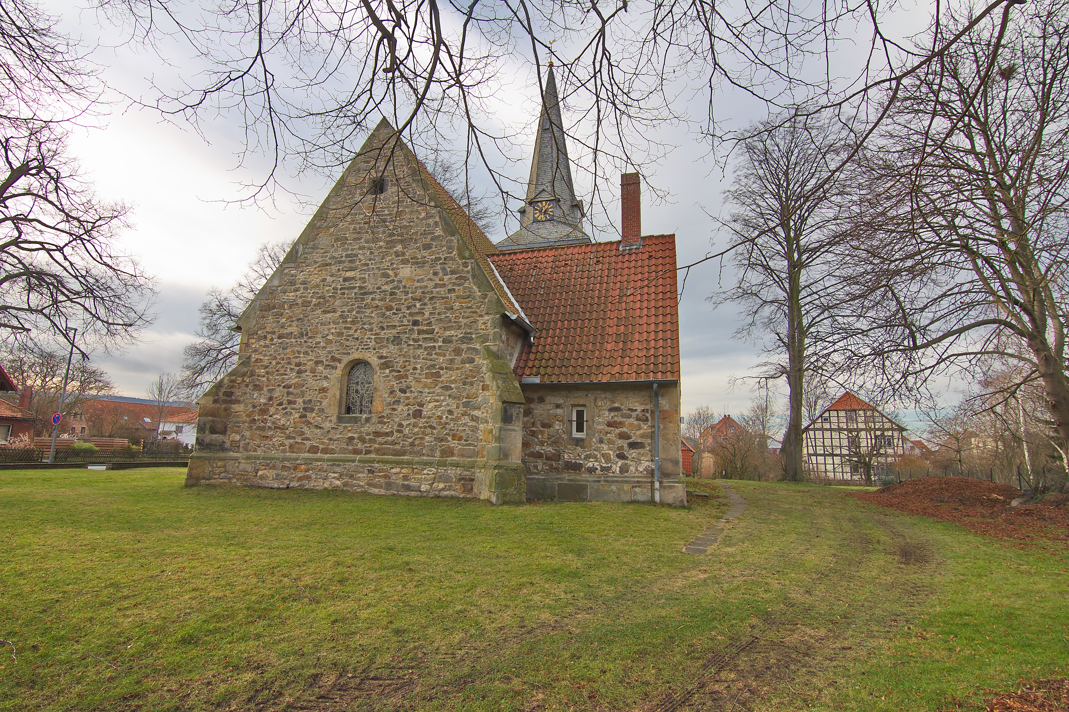 Heilig-Kreuz-Kirche in Kirchdorf (Barsinghausen), Niedersachsen, Deutschland